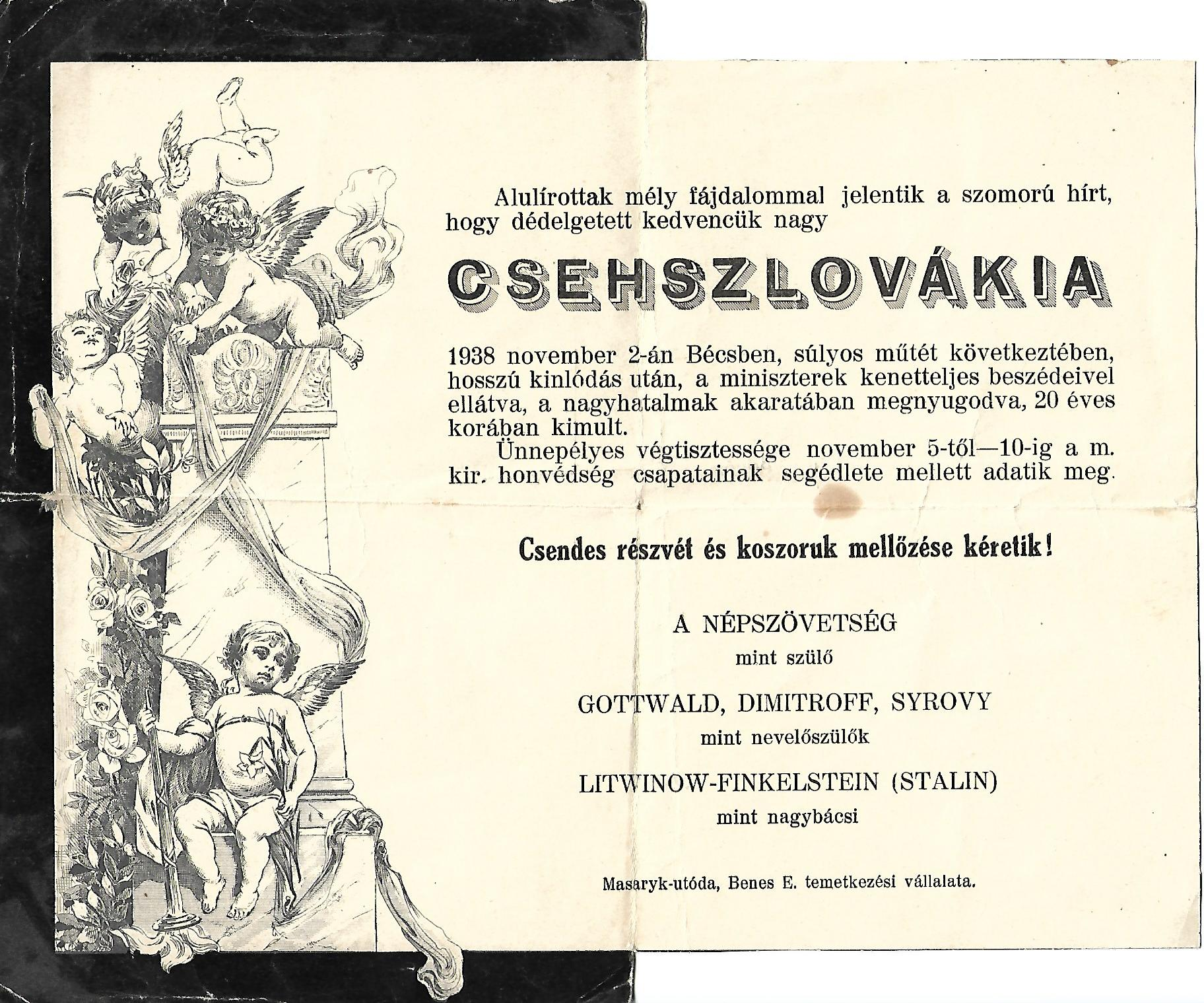 Szórólap az első bécsi döntésről, amely Csehszlovákia felbomlásáról, és a magyar csapatok közelgő bevonulásáról tájékoztat ironikus formában.